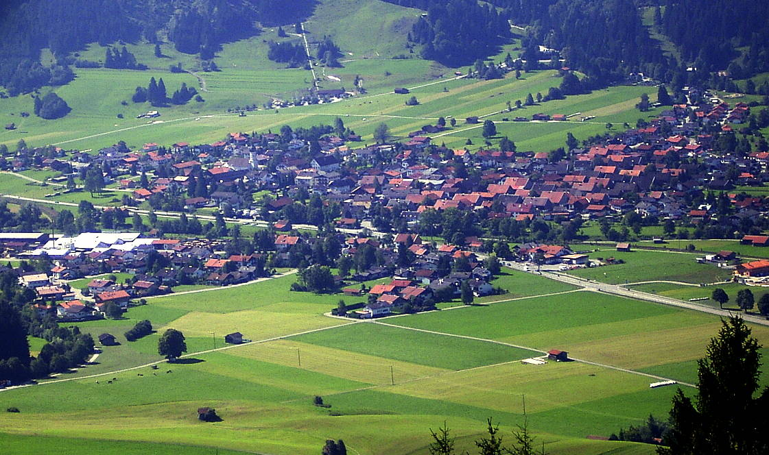 Johannes Aubele (Original text: Unterammergau vom Hörnle aus)